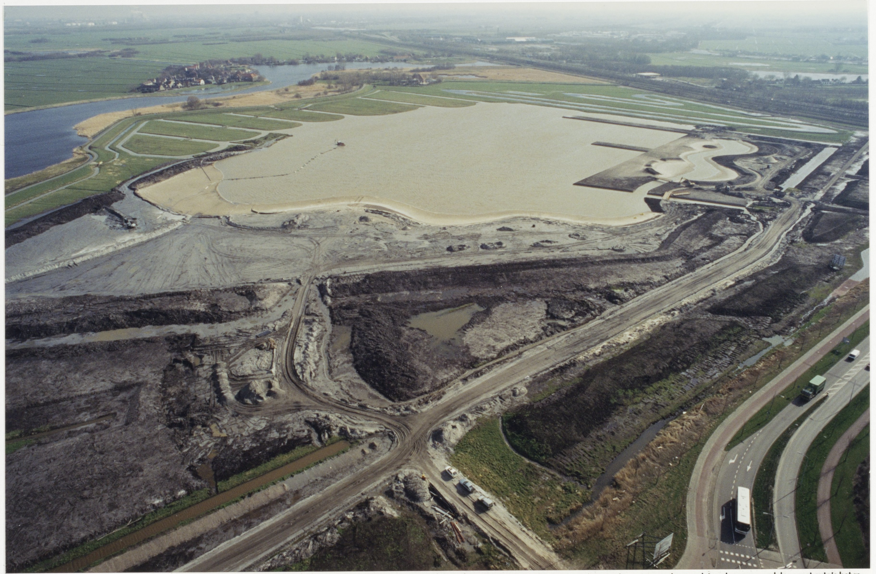 CollectieCollectie Fotoburo de BoerInventarisnummerNL-HlmNHA_54035222NL-HlmNHA_1478_41039KBeschrijvingAanleg van een recreatieplas aan de rand van de Waarderpolder.FotonummerNL-HlmNHA_1478_5314DocumenttypeTopografische prenten, tekeningen en foto'sVervaardigerHouts, Nils van (UP de Boer) Soort vervaardigerFotograaf AnnotatiesHD.140395.LandNederland ProvincieNoord-Holland GemeenteHaarlem PlaatsHaarlem StraatCamera Obscuraweg GeografischWaarderpolder Begindatum03-1995Einddatum03-1995TechniekFoto TrefwoordenPanorama's en profielen, Grondwerkzaamheden